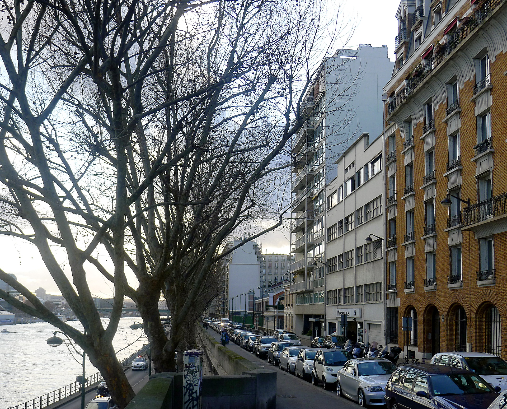 Quai Louis-Blériot - Paris XI